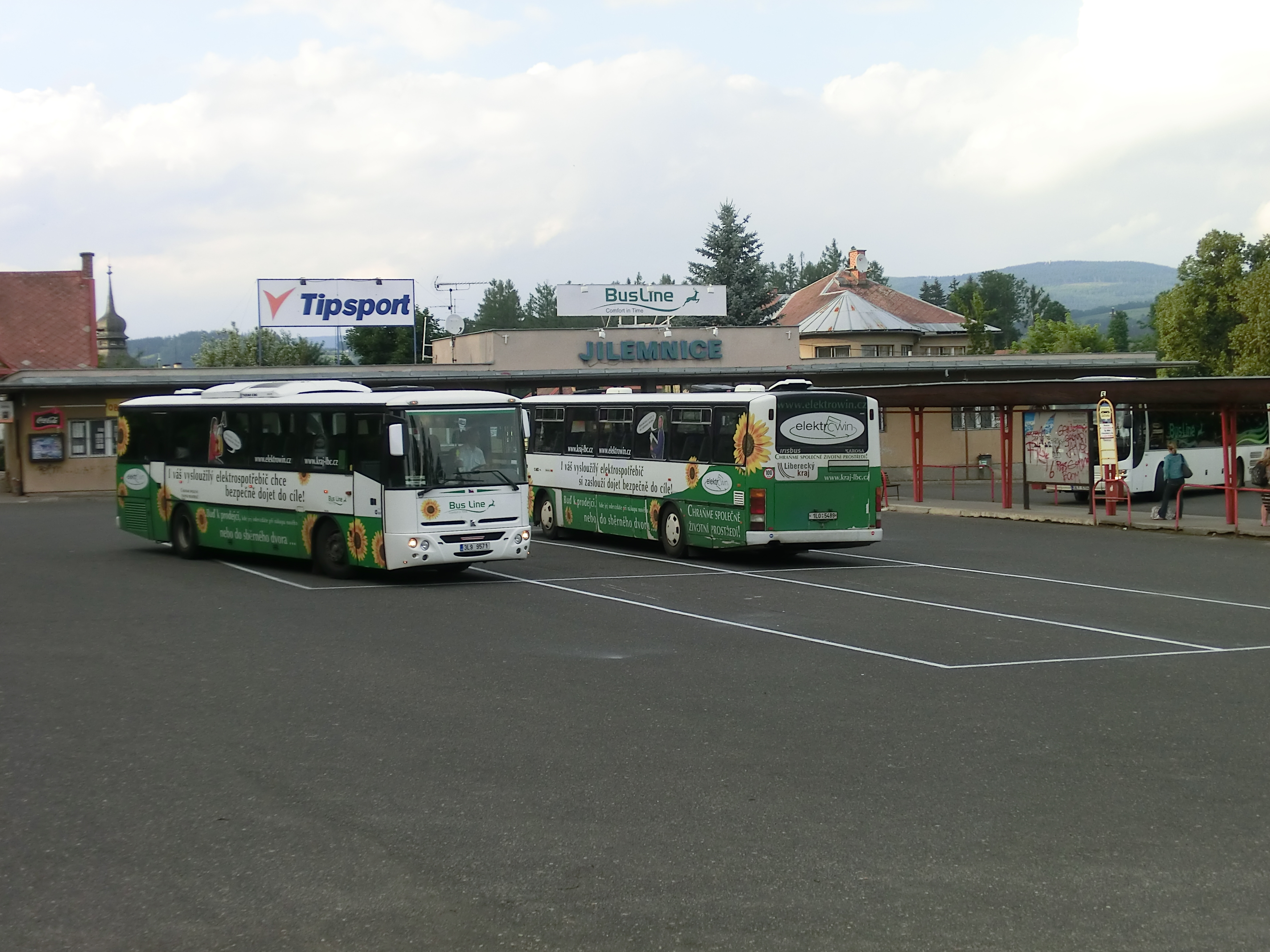 Autobusové nádraží Jilemnice. Dvojice dálkových Karos společnosti BusLine a.s. s celovozovou reklamou "elektrowin". Vlevo Karosa C 955, stažená z jiné linky, obsluhuje od roku 2011 dálkovou linku Vrchlabí - Liberec - Ústí nad Labem. Vpravo Karosa LC 936, která tuto dálkovou linku jezdila dříve a dnes dosluhuje na lokálních linkách okolo Jilemnice. Oba tyto ojeté vozy jsou od roku 2010 pokryty celovozovou reklamou na systém "elektrowin" pro zpětný odběr spotřebičů.